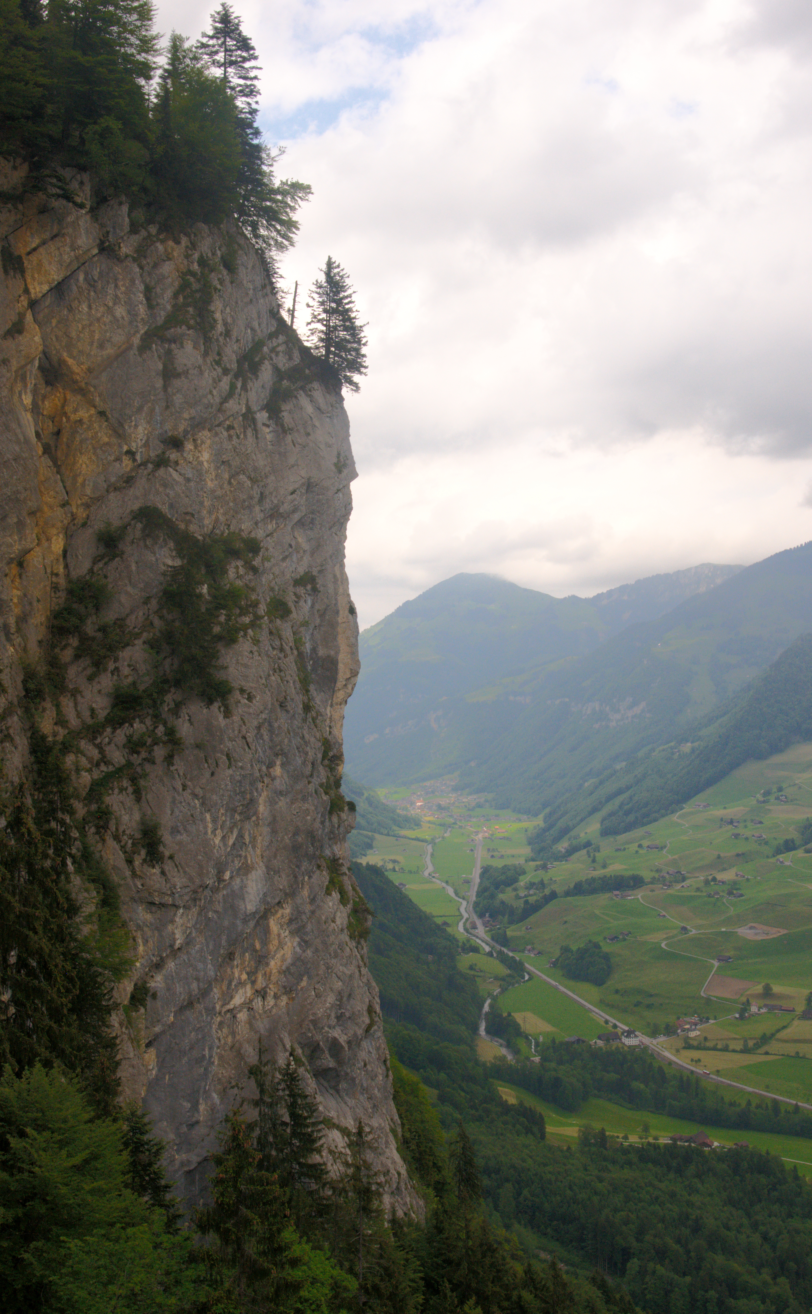 Buirebähnli Rugisbalm, vor der Felswand, Blick ins untere Engelberger Tal